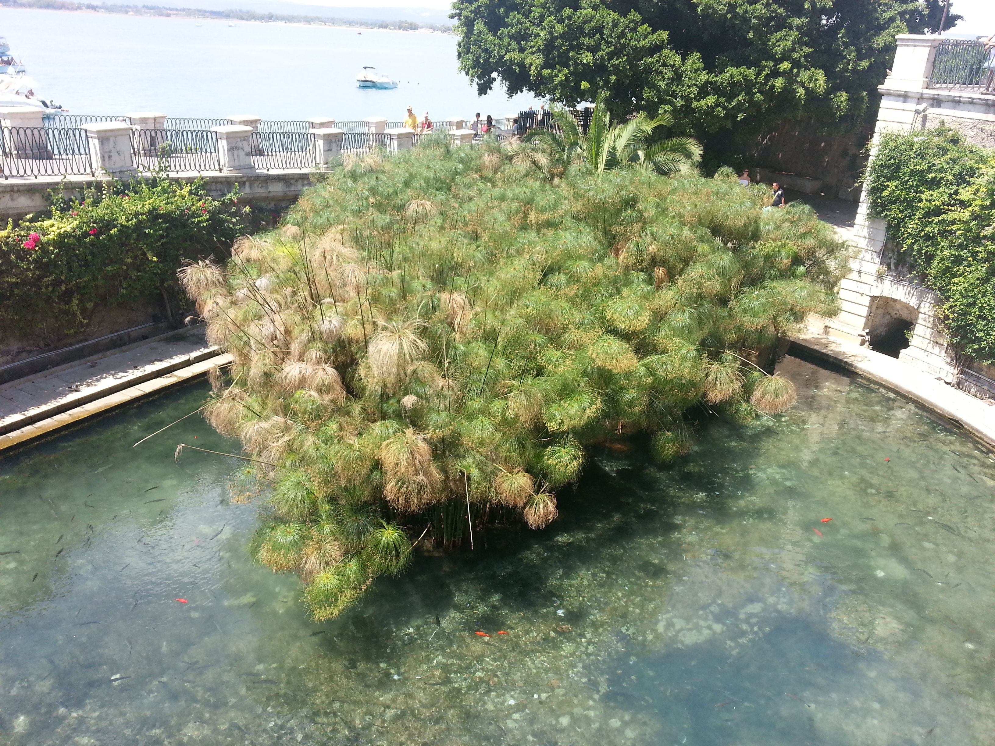 Fonte di Aretusa, Ortigia (Sr, Italia)